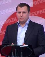 Борис Филатов